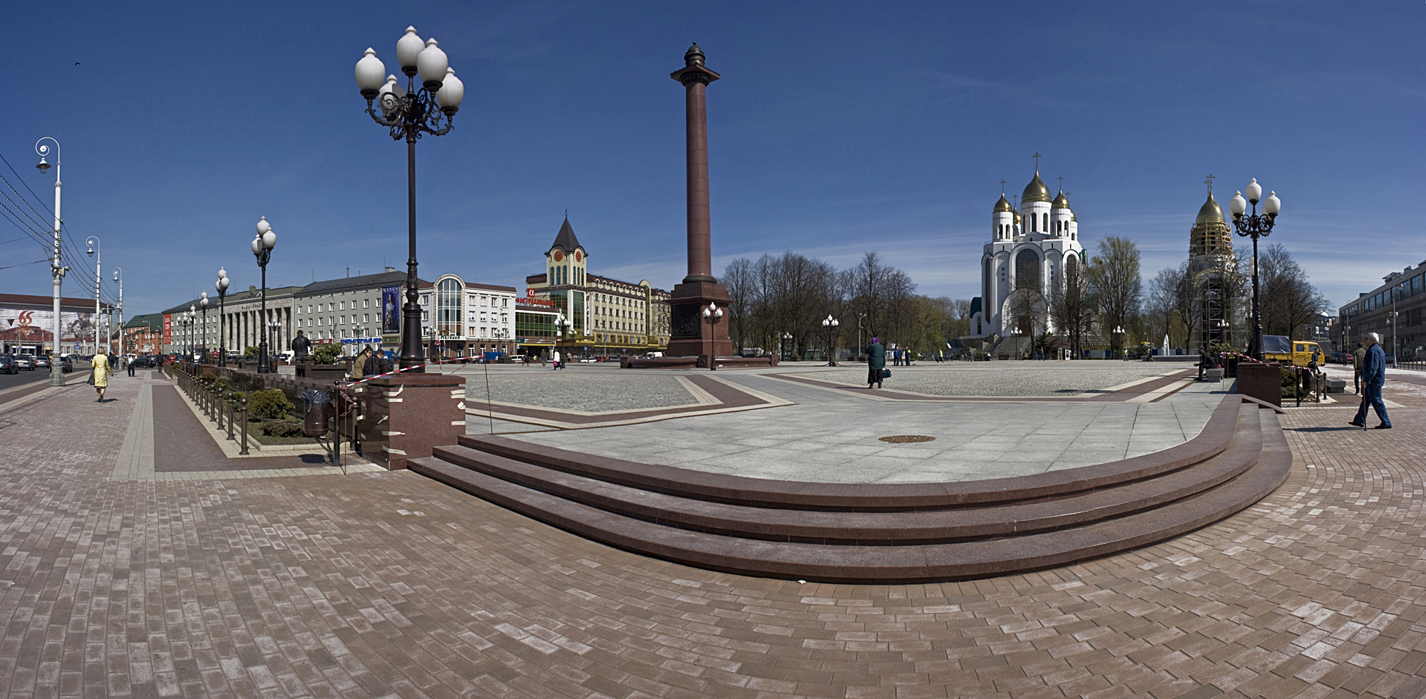 До начала XX века на месте нынешней площади Победы располагались Штайндаммские и Трагхаймские ворота городских укреплений. В начале XX века сооружения внутреннего кольца городских укреплений потеряли военное значение, были выкуплены городом и снесены. Трагхайимские ворота были снесены в 1910 году, Штайндаммские — в 1910 году. Примерно на их месте была устроена площадь Hanzaplatz, то есть нынешняя площадь Победы[1]. Средневековый Кенигсберг входил в Ганзейский союз. В 1920—1923 годах был построен комплекс павильонов Восточной ярмарки, главные ворота располагались на северной оконечности площади. На противоположной стороне площади было выстроено здание торговых представительств, позднее оно стало использоваться кёнигсбергским городским правлением. После прихода нацистов к власти площадь была переименована в Адольф-Гитлер-Плац (площадь Адольфа Гитлера). После войны площадь стала называться Площадью Победы. В 1958 году на площади был установлен памятник Ленину работы скульптора Топуридзе.До этого здесь возвышался памятник Сталину. В 1996 году рядом с площадью началось строительство Храма Христа Спасителя. В преддверии 750-летнего юбилея Калининграда площадь была капитальным образом реконструирована. С площади бын убран памятник Ленину (после реставрации перенесён в сквер перед Домом искусств, бывший кинотеатр «Октябрь»), также снесли трибуны. В ходе реконструкции на площади устроили фонтаны и установили Триумфальную колонну, напоминающую Александровскую колонну в Санкт-Петербурге.